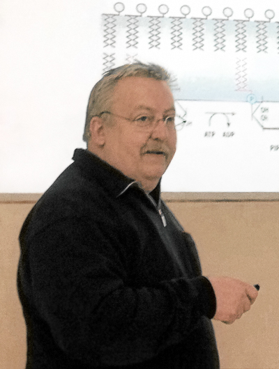 Professor Klobeck 2011 vor Studenten.